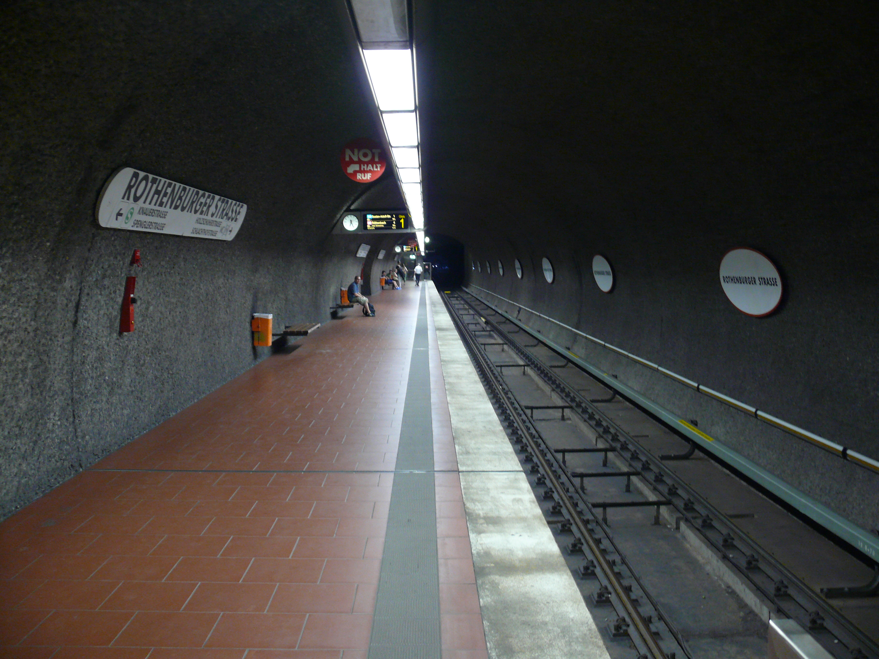 Gleis 1 am U-Bahnhof Rothenburger Straße in Nürnberg.